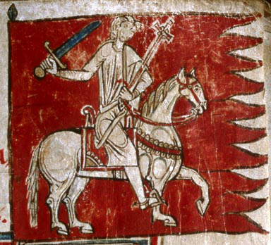 Pendón de la Orden de Santiago en el Tumbo menor de Castilla (1170-1175). Véase A. Montaner Frutos (ed. lit.) Cantar de mio Cid, Barcelona, Galaxia Gutemberg; Real Academia Española, 2011, pág. 725.